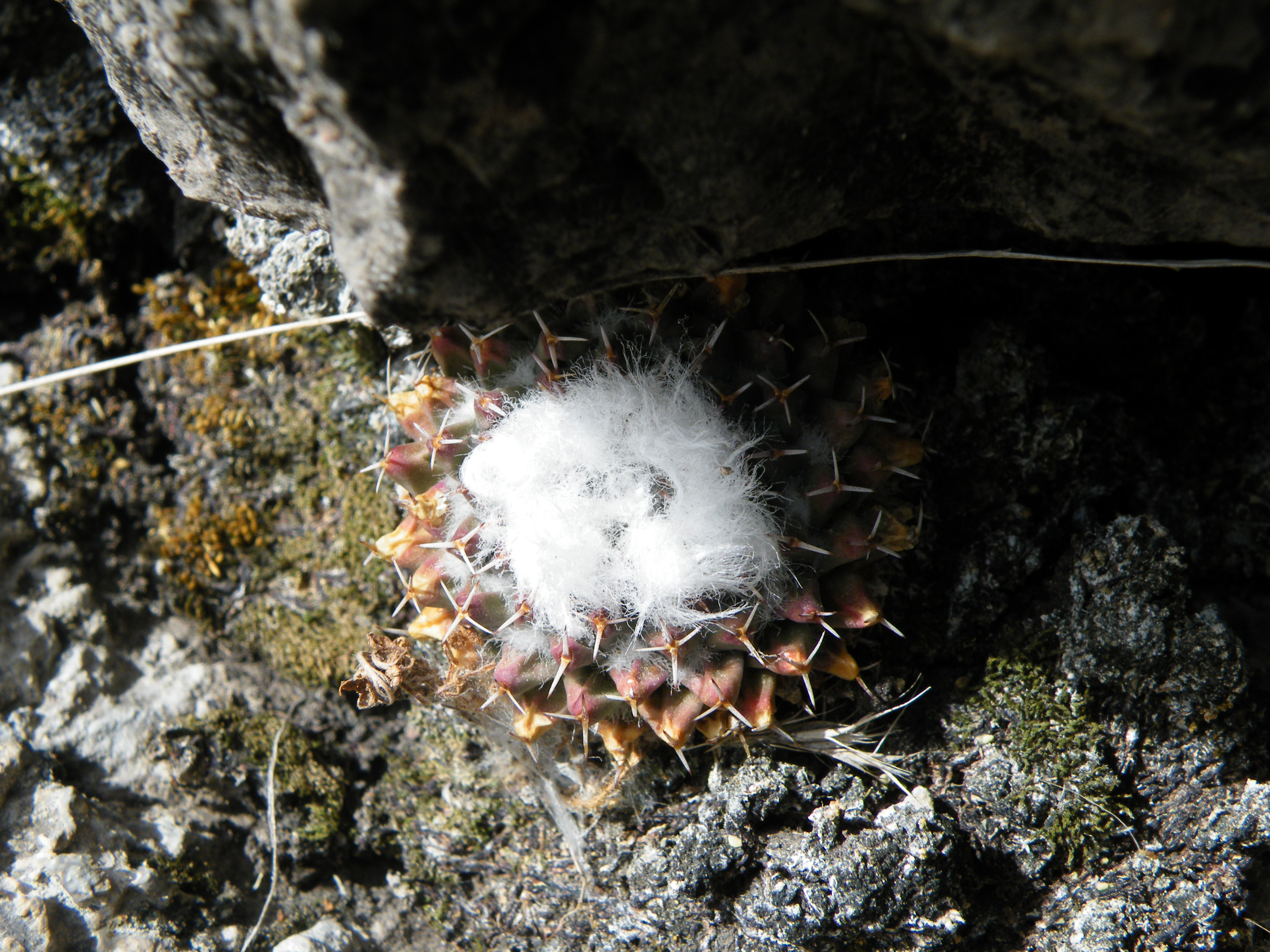 Tuxagni near Lagunilla, Hidalgo